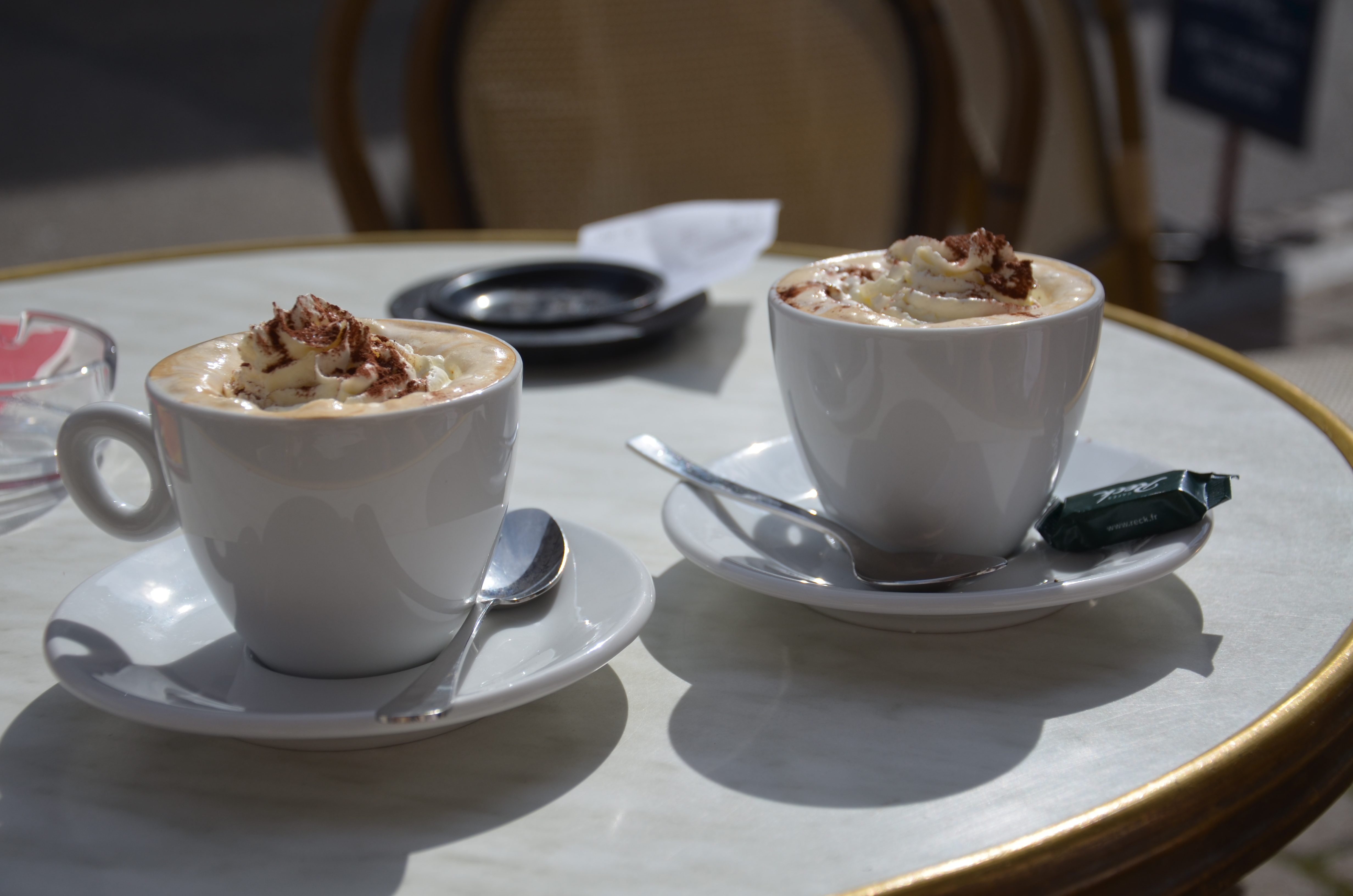 Deux cafés viennois servis en terrasse.